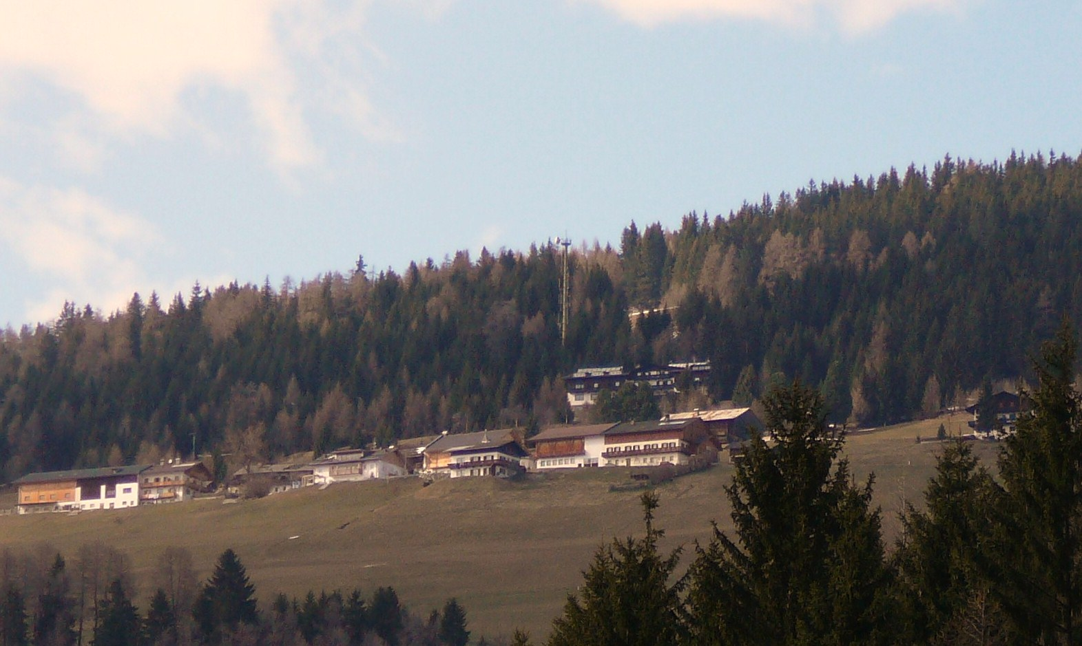 Monte Rota Dobbiaco